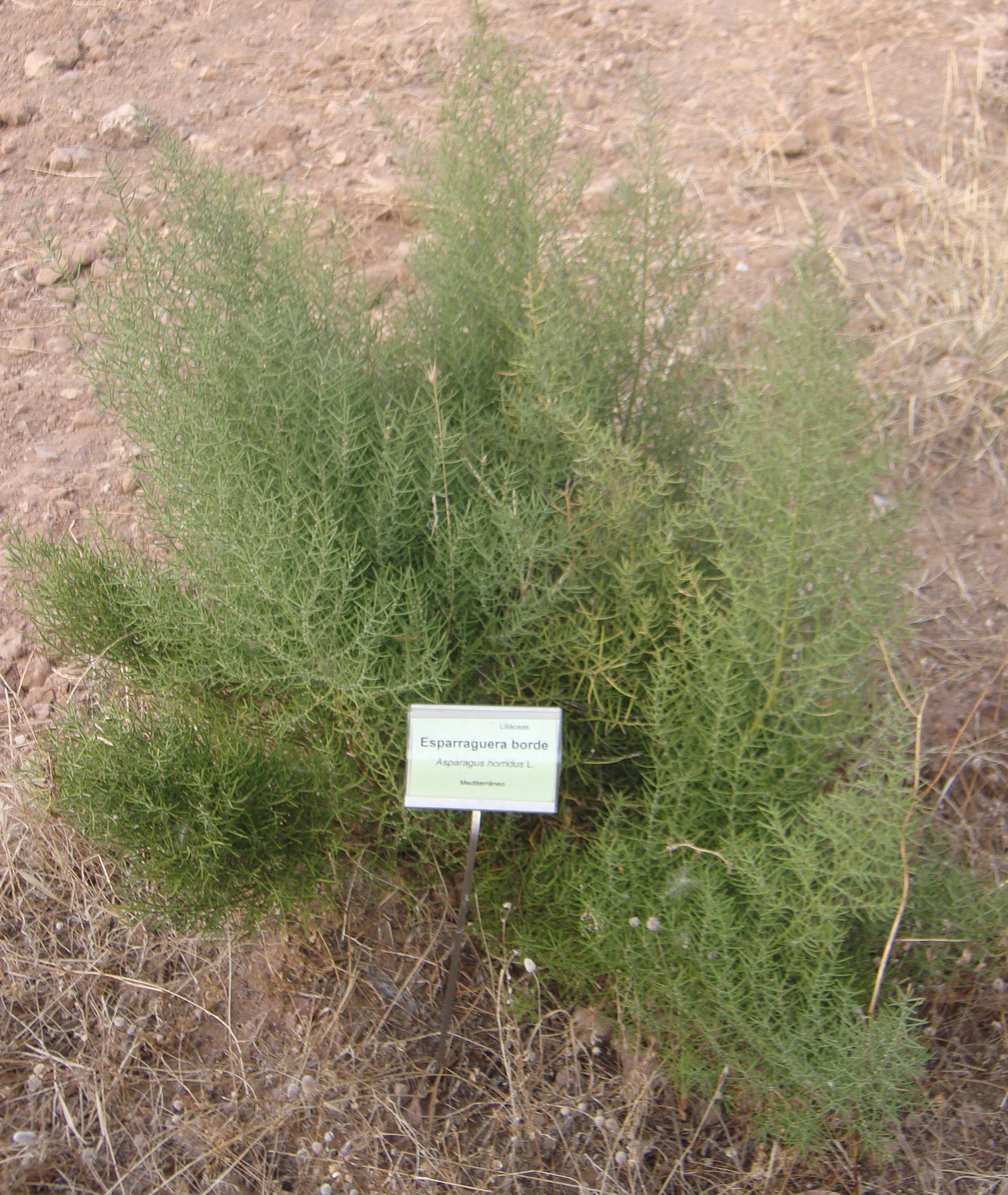 planta en el Jardín Botánico del Albardinal de Rodalquilar, en Nijar, provincia de Almería (España). Se encuentra dentro del Parque natural del Cabo de Gata-Níjar.